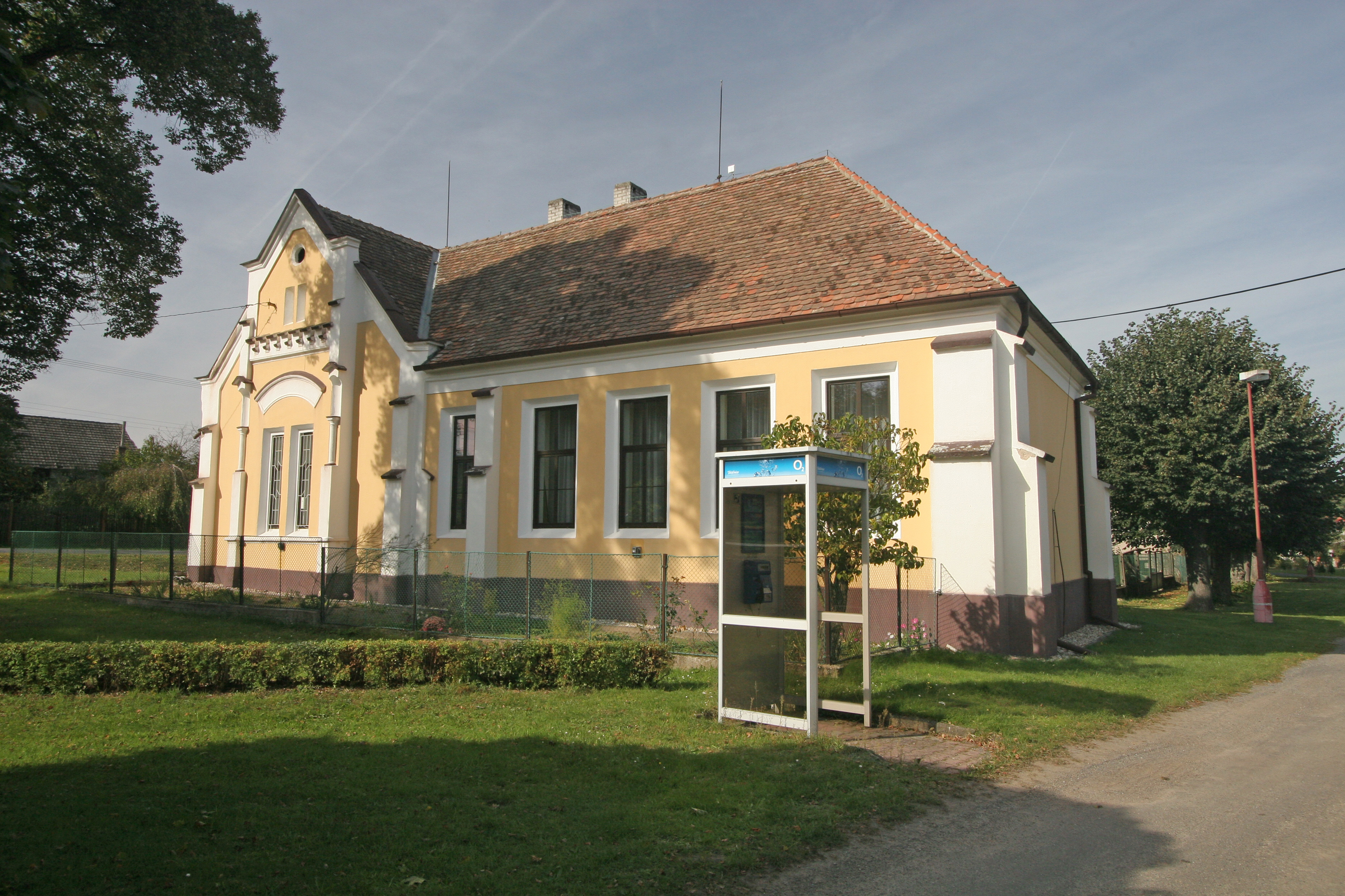 Litošice obecní úřad